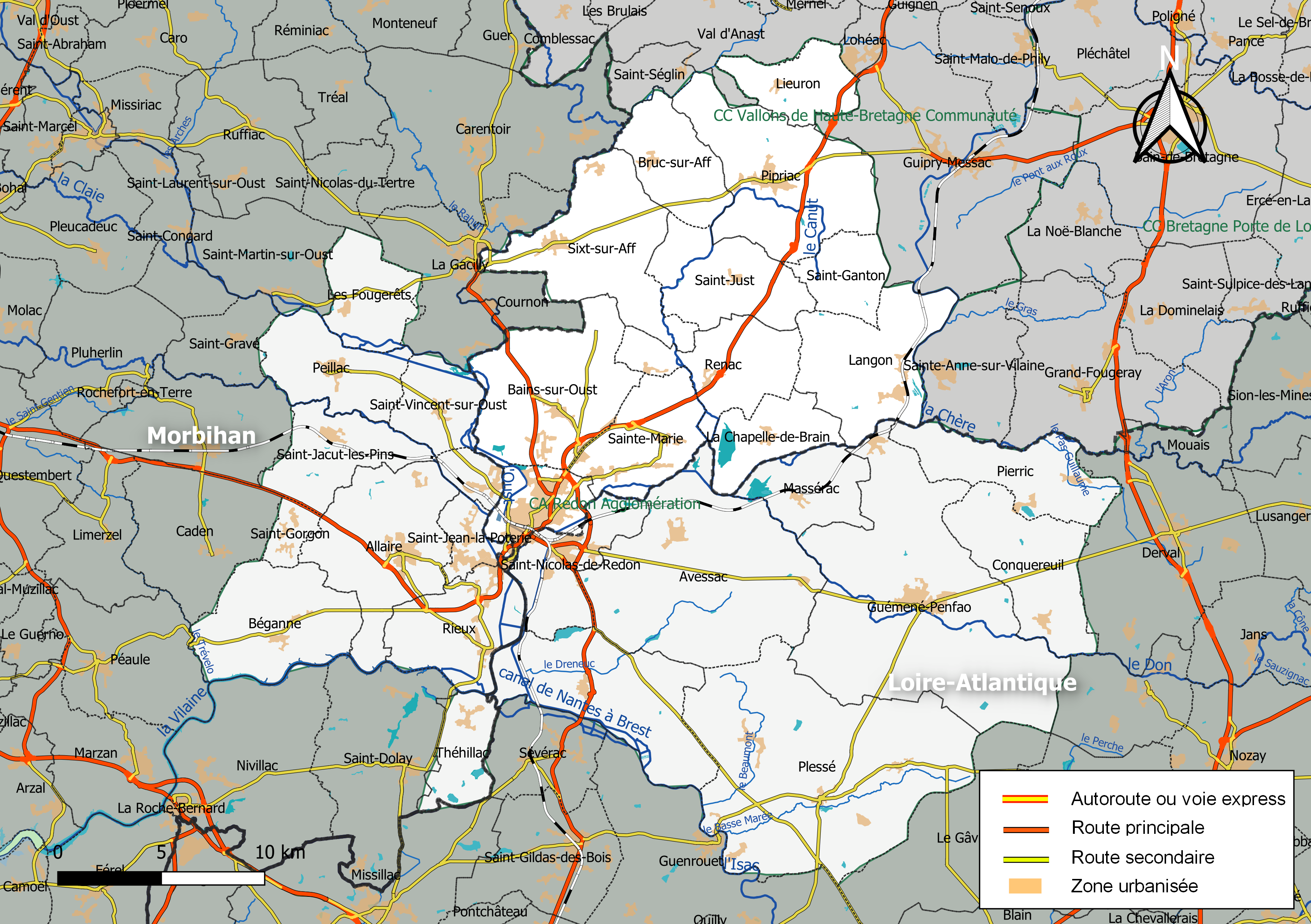 Carte géographique de l'intercommunalité Redon Agglomération, département d'Ille-et-Vilaine, France. Composition au 1er janvier 2019.